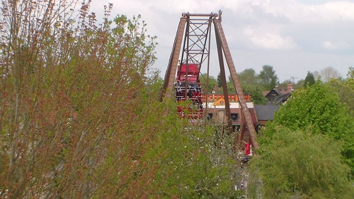 Black Pearl